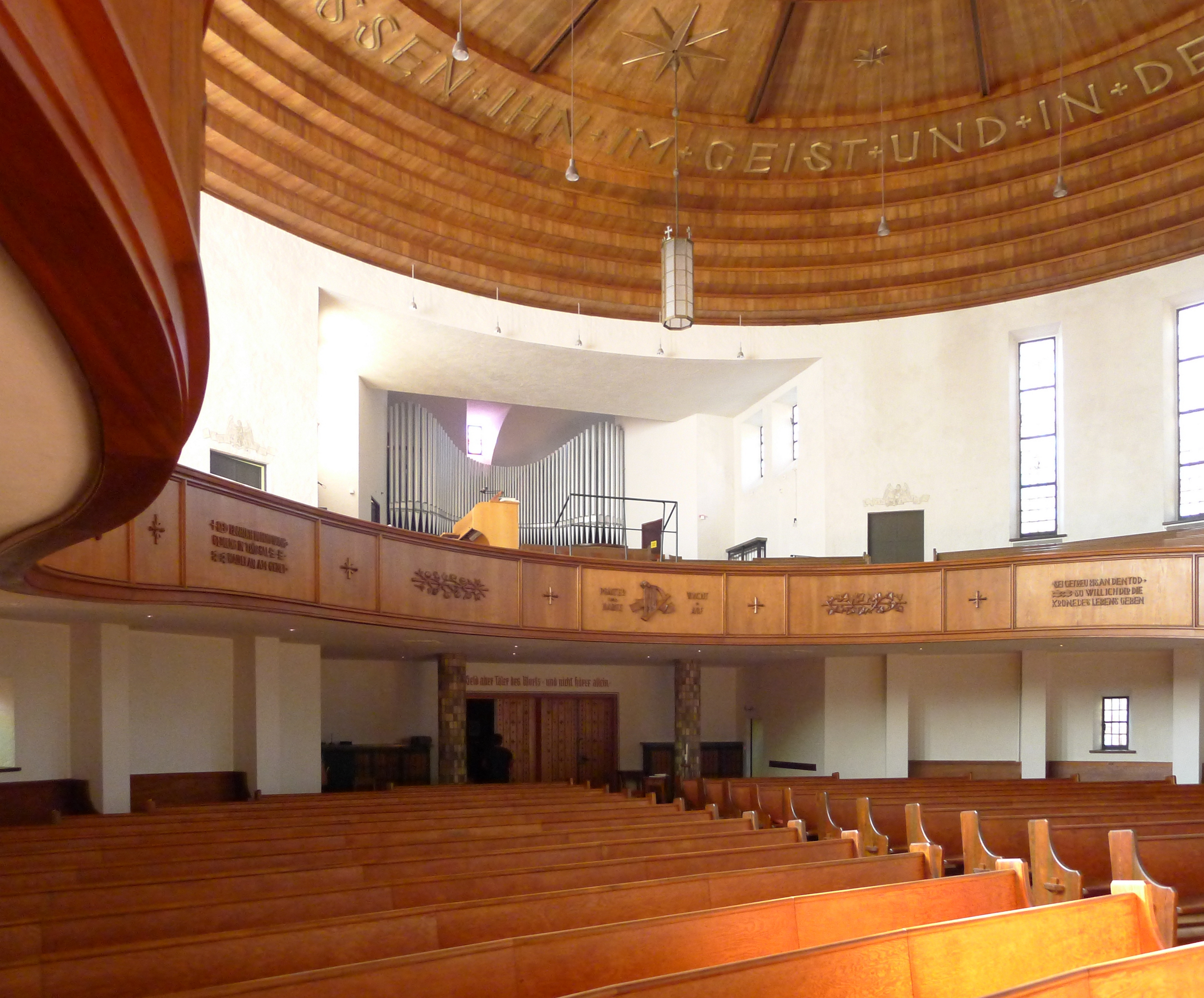 Blick Richtung Eingang mit der Orgel auf der Empore